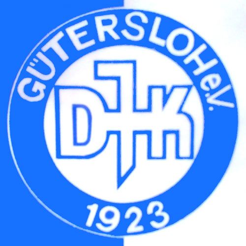 Wappen der DJK Gütersloh